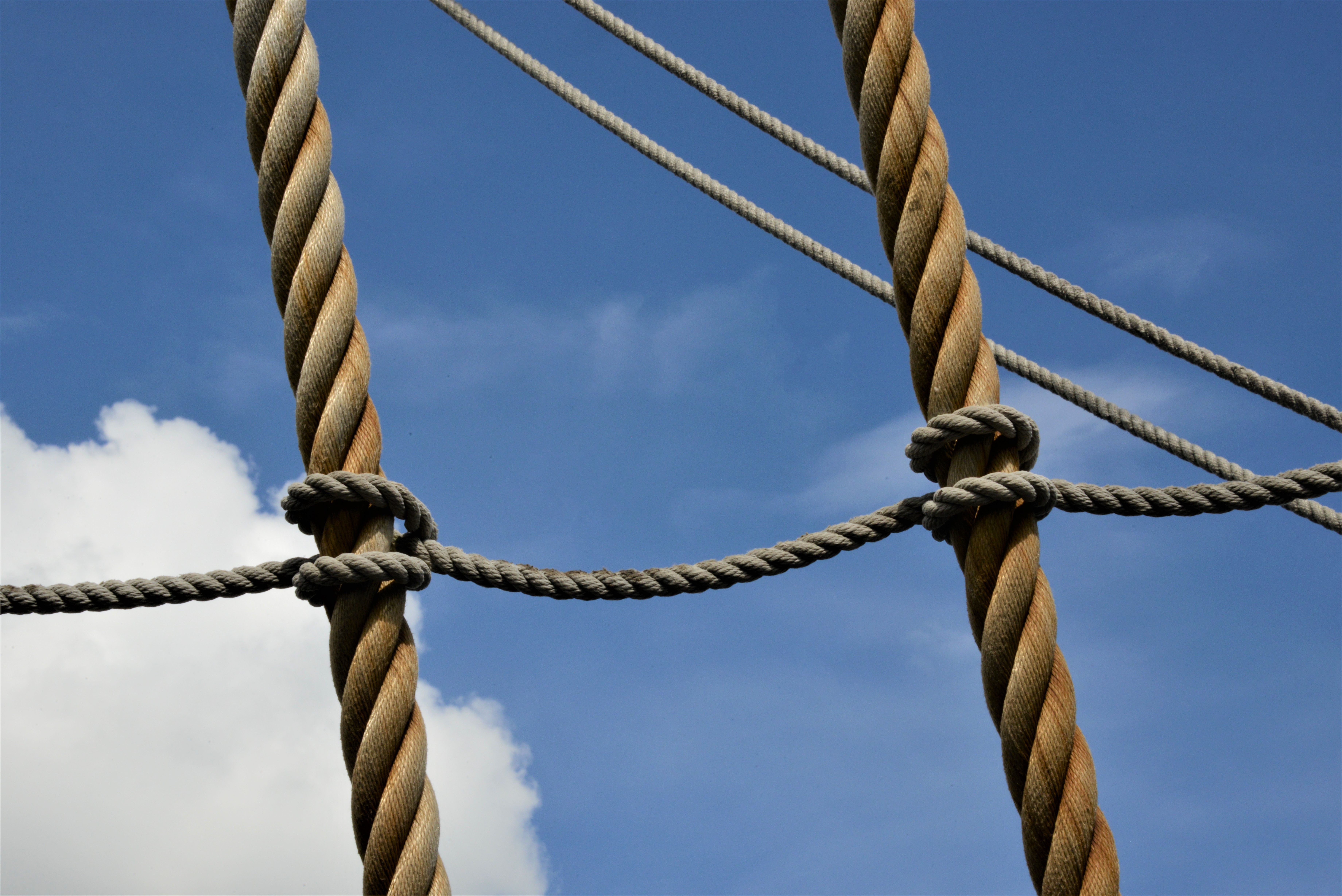 Elément du « Galeón Andalucía » photographié depuis les ponts du navire. La Rochelle, Charente-Maritime, France.